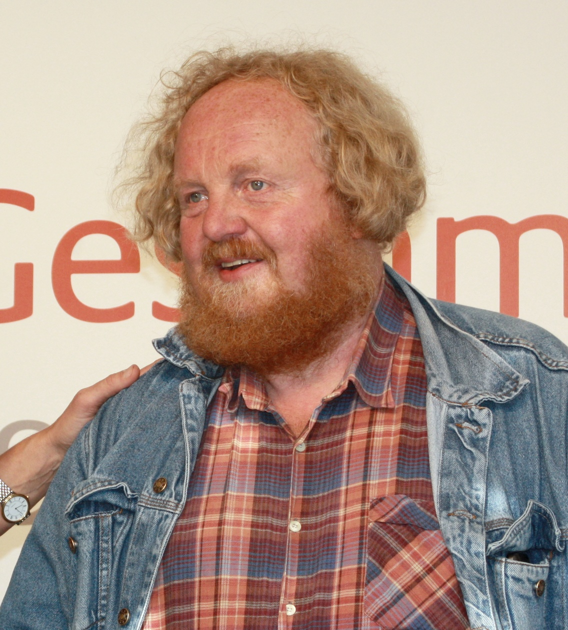 Eckart Brandt, deutscher Pomologe (Obstbaumkundler) und Autor. Hier am 2. Oktober 2012 währed einer Veranstaltung im Rahmen der 'Geschmackstage 2012' auf dem Münchner Viktualienmarkt. Titel des Werks: "Eckart Brandt (2012 in München"